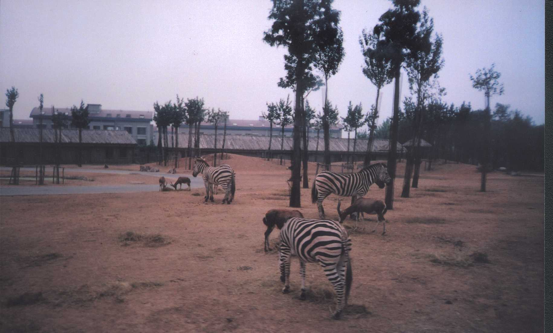 Zebra_in_zoopark.jpg